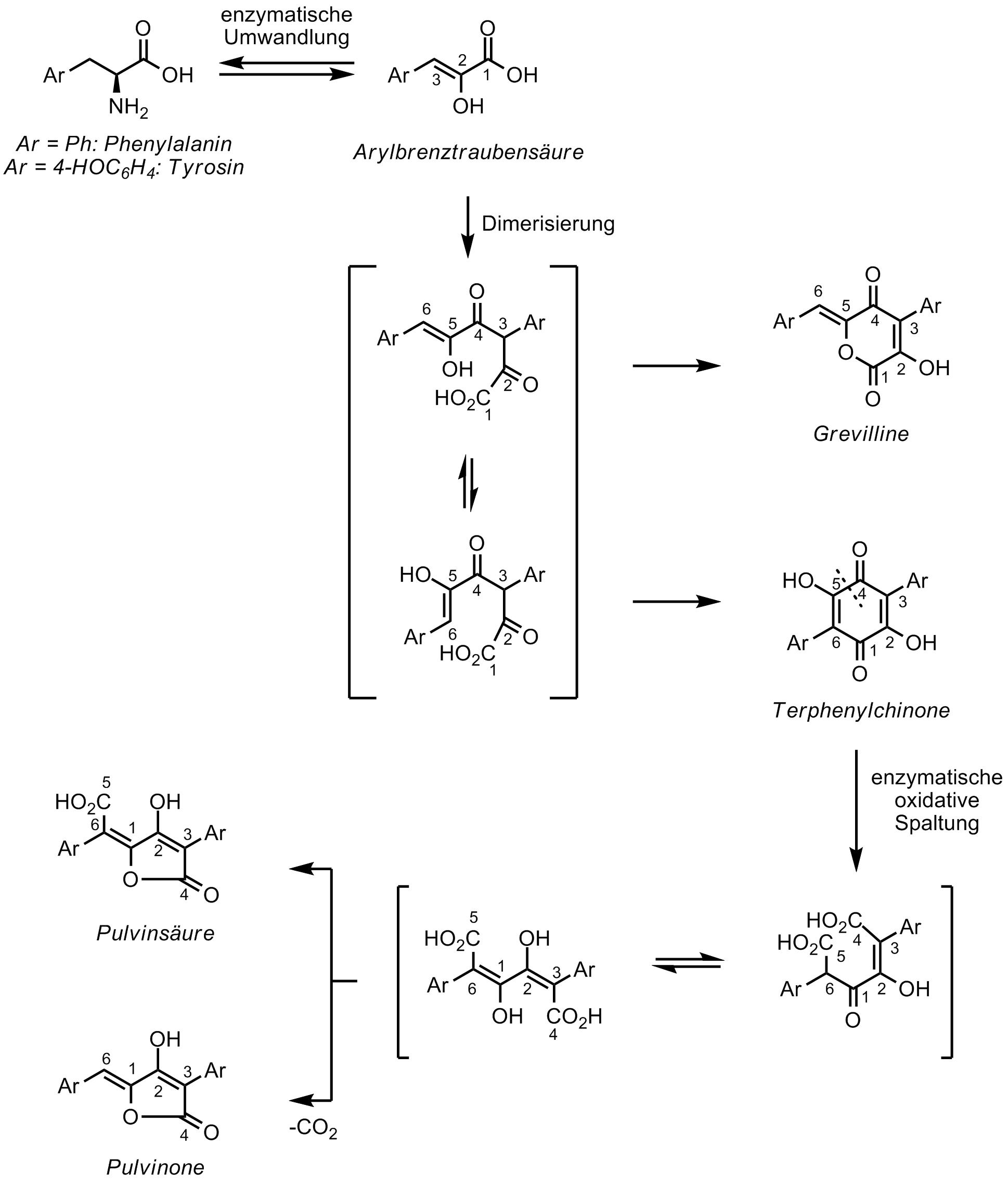 Mutmaßliche Biosynthese einiger Pilzpigmente